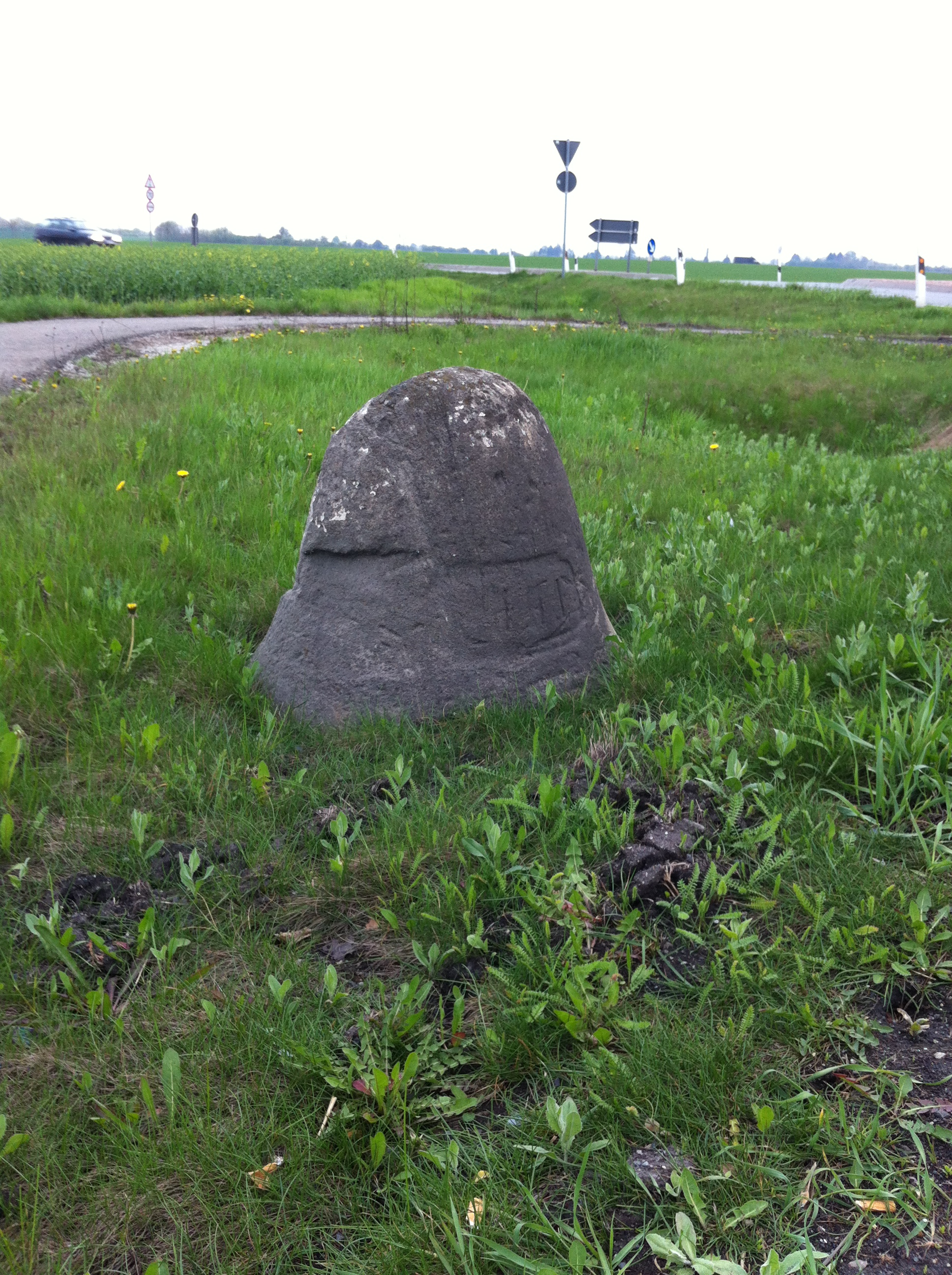 Preußischer Viertelmeilenstein bei Theißen an dewr B91.